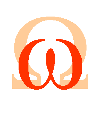 Greek letter